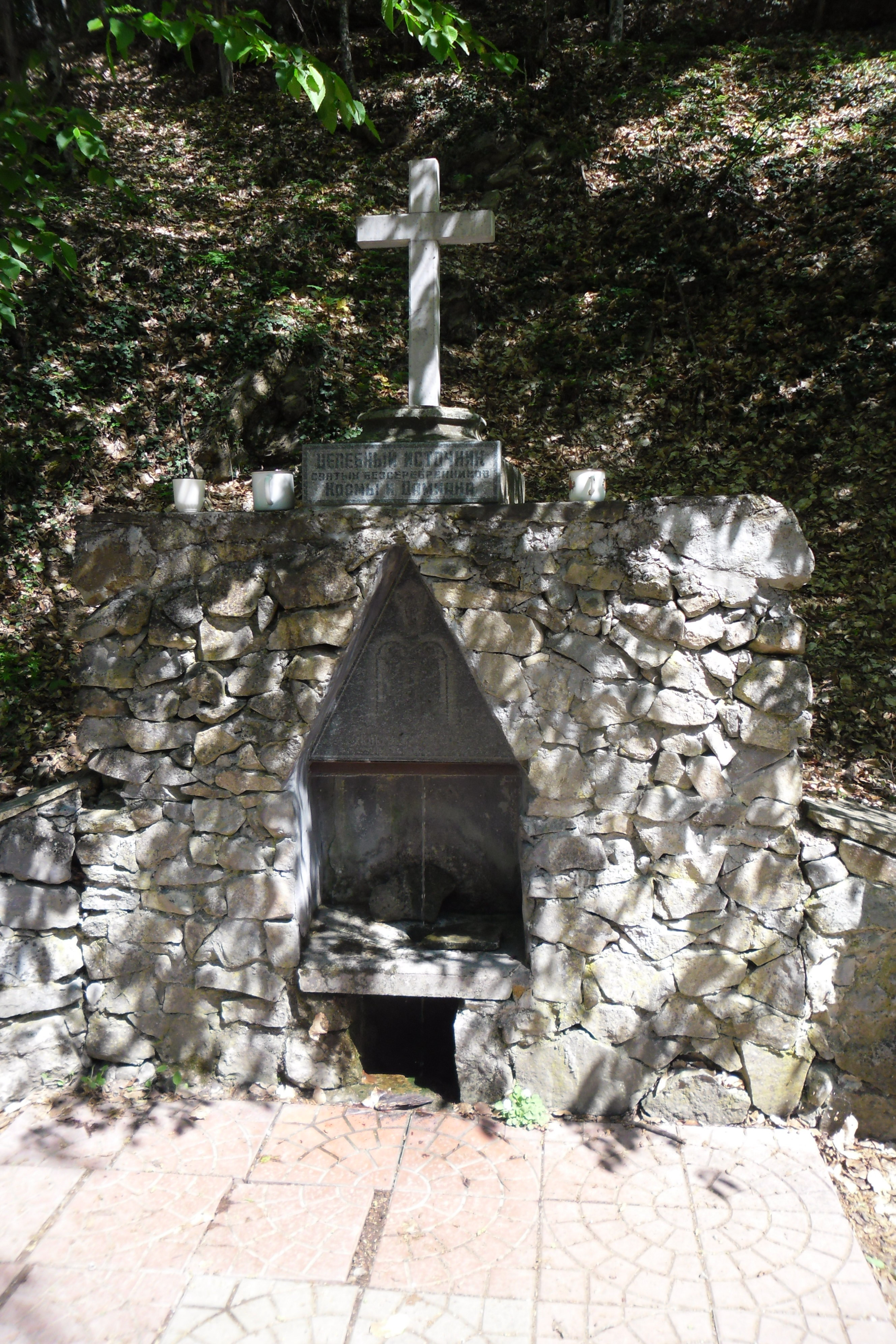 Фото